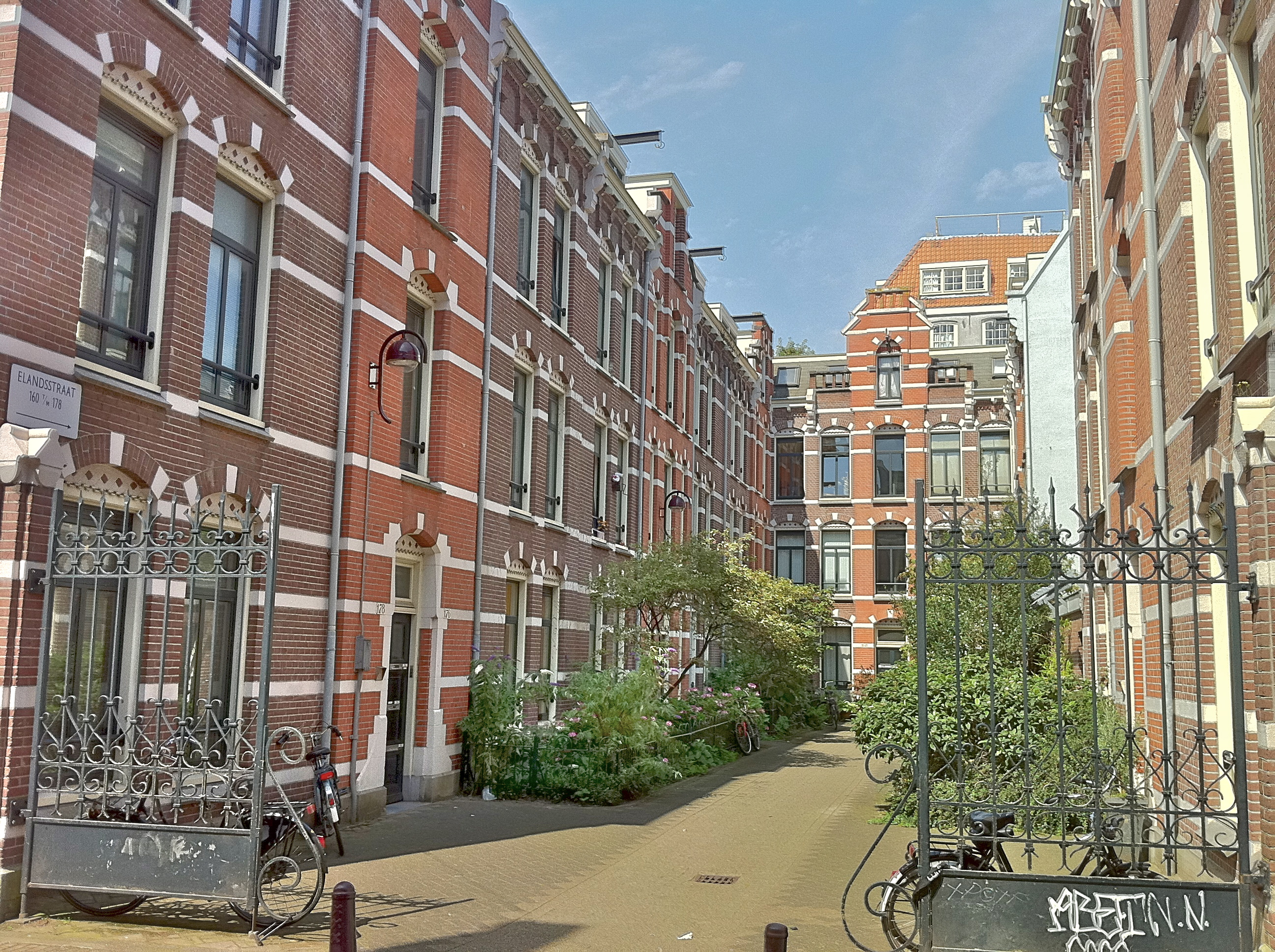 Hof van Parijs Amsterdam